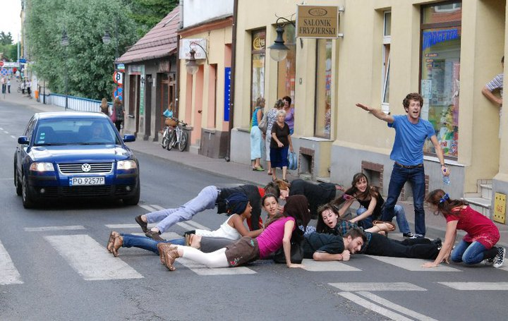 Happening